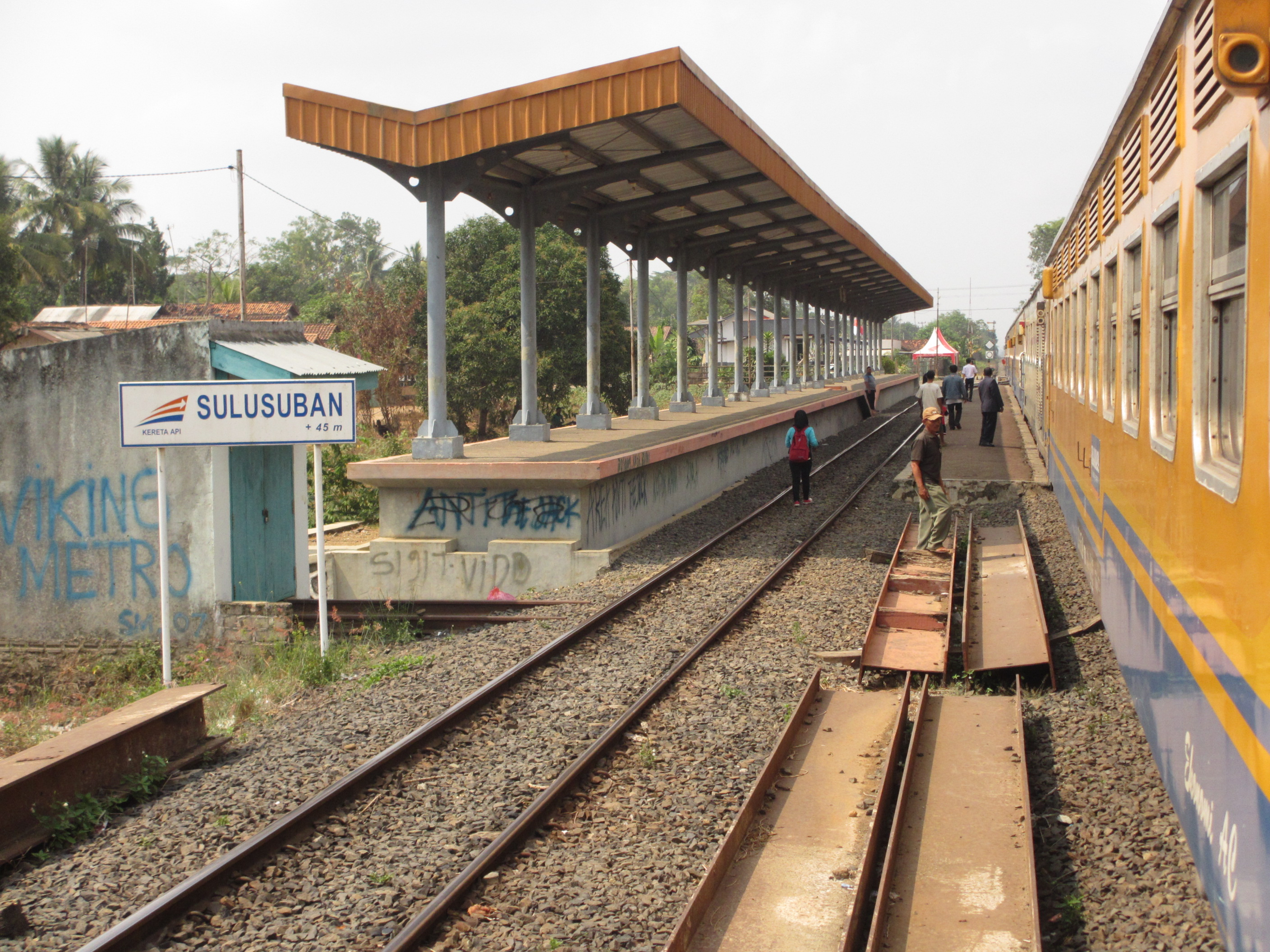 Peron Stasiun Sulusuban.